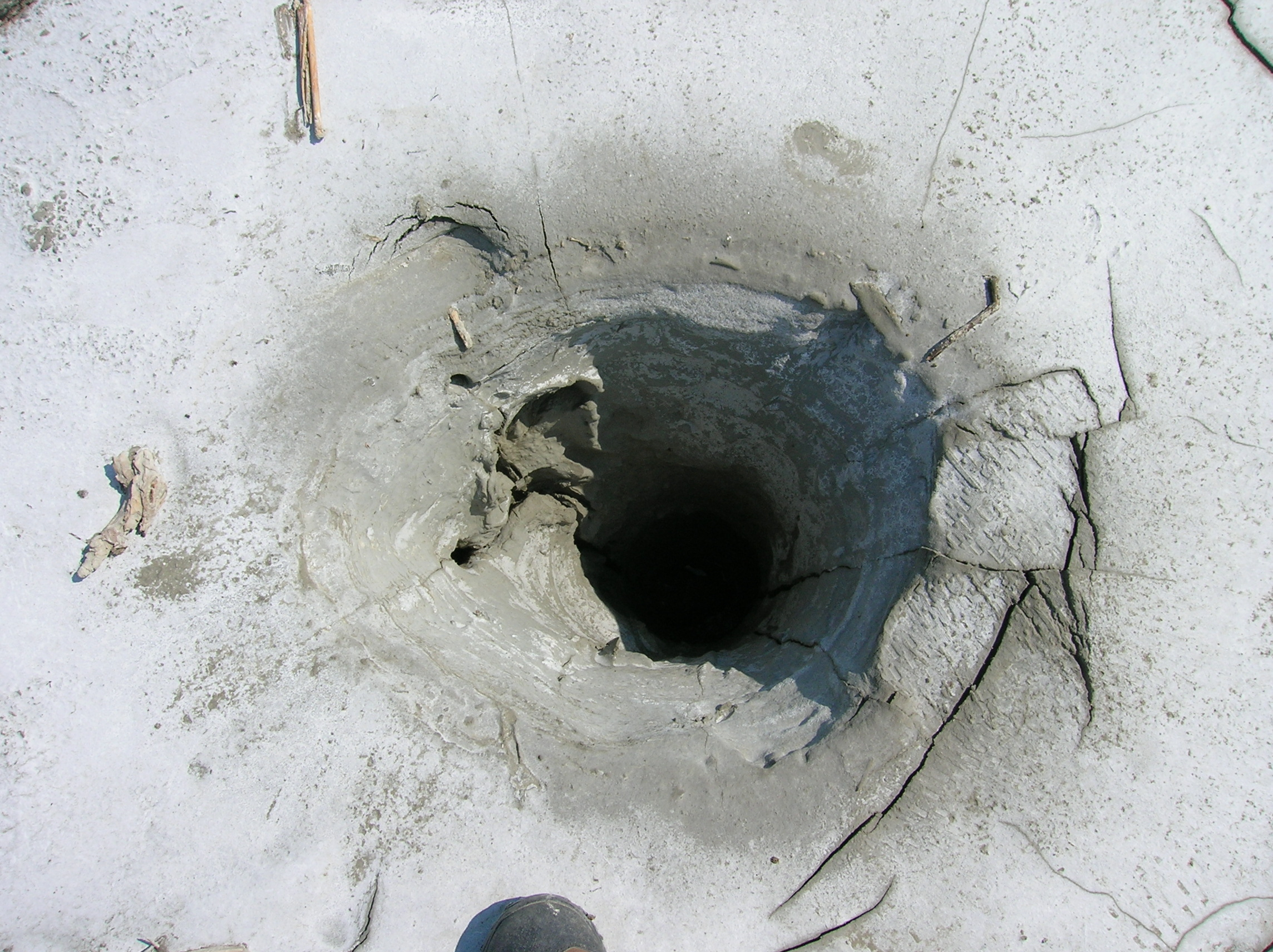 Near village Beciu (Scorţoasa commune)